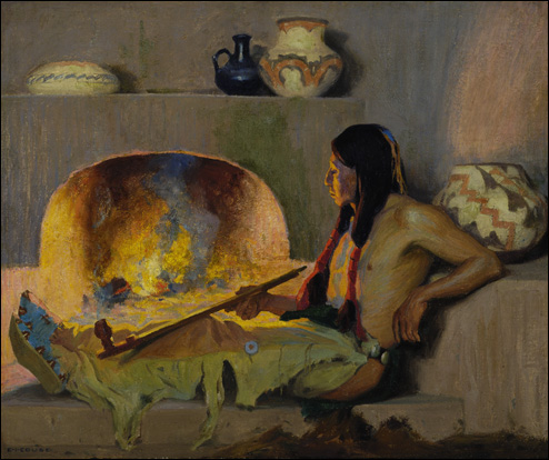 Contentment